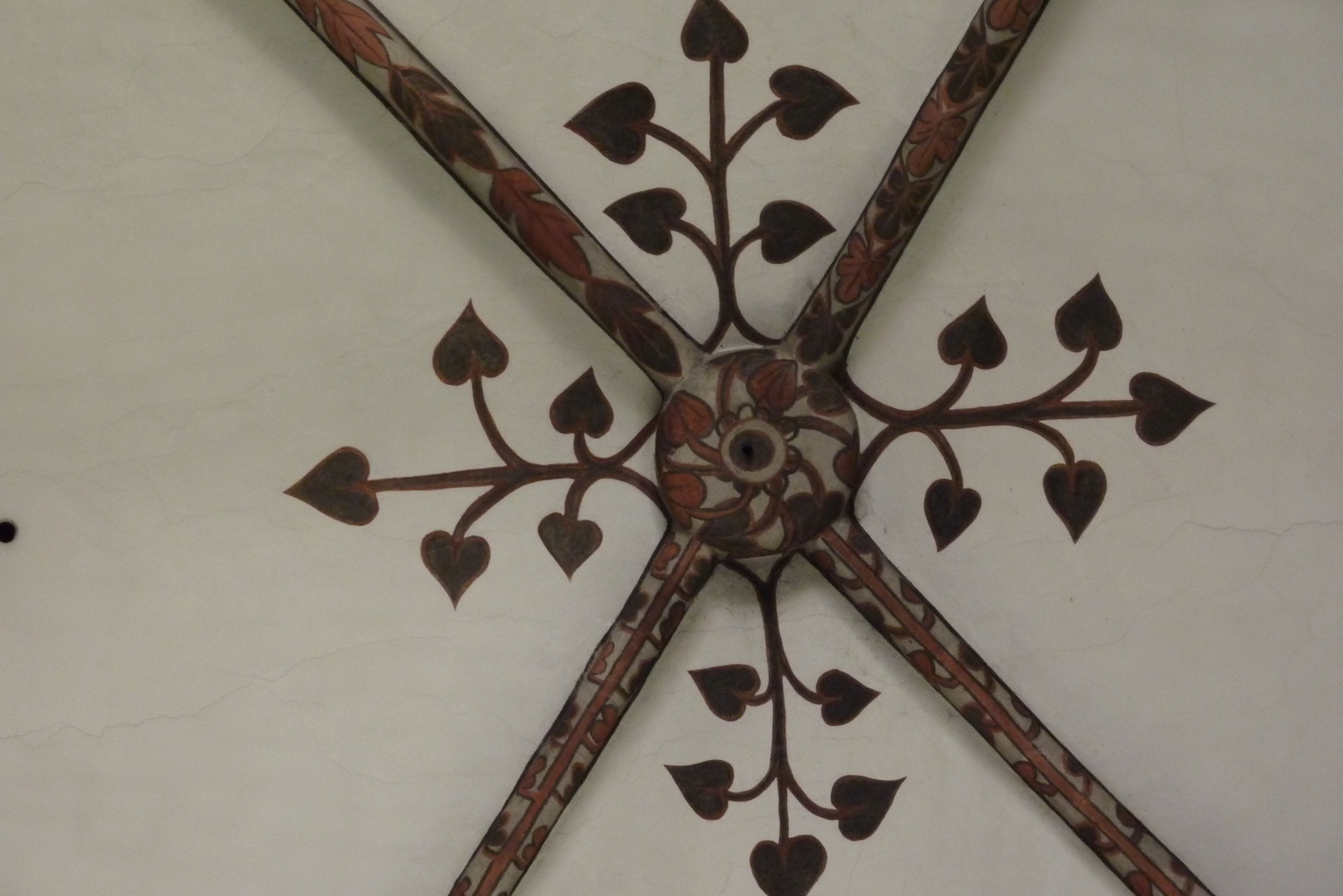 Oberbreisig, Katholische Pfarrkirche St. Viktor, Deckenmalerei im Mittelschiff